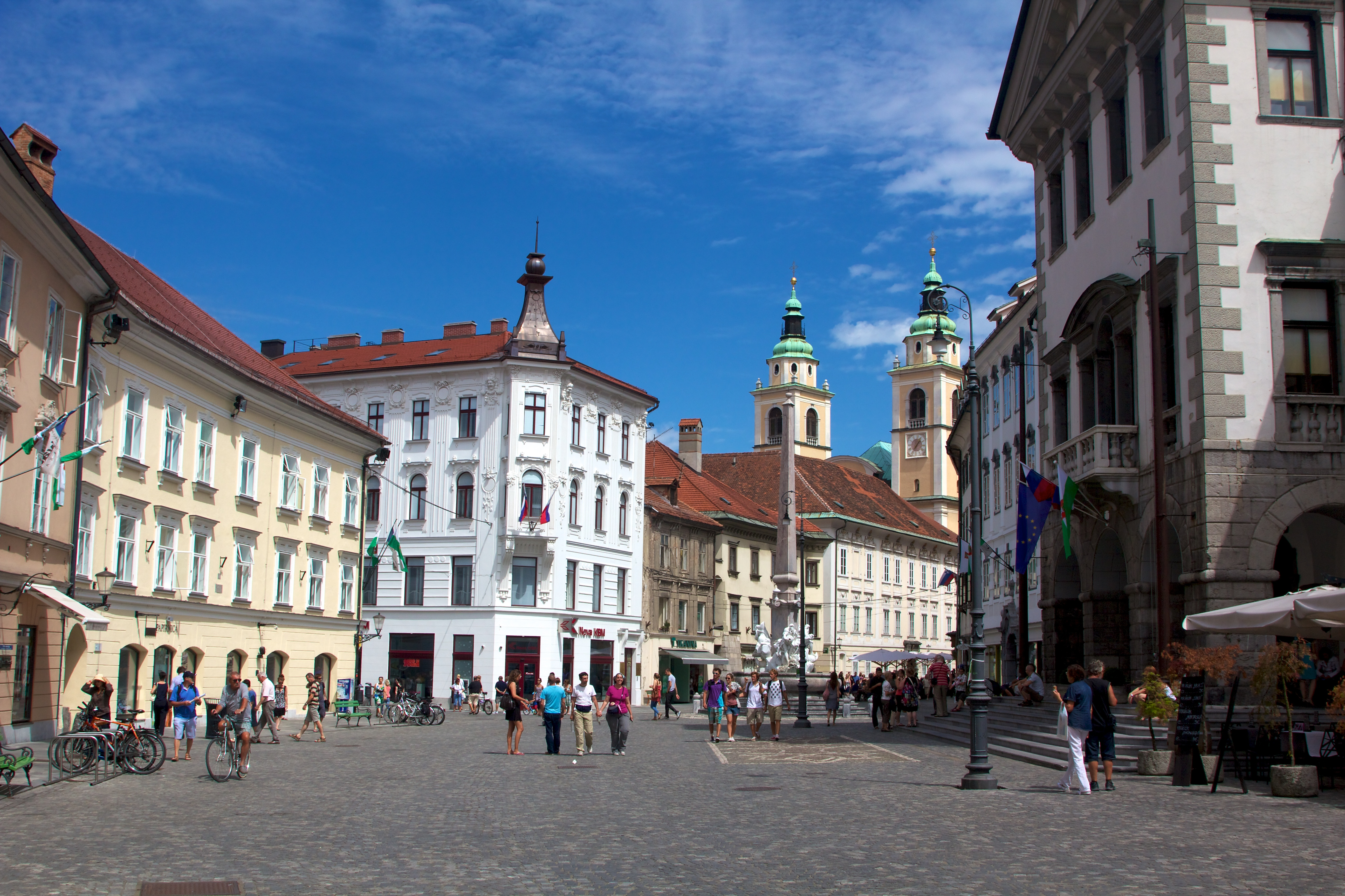 Liubliana 029